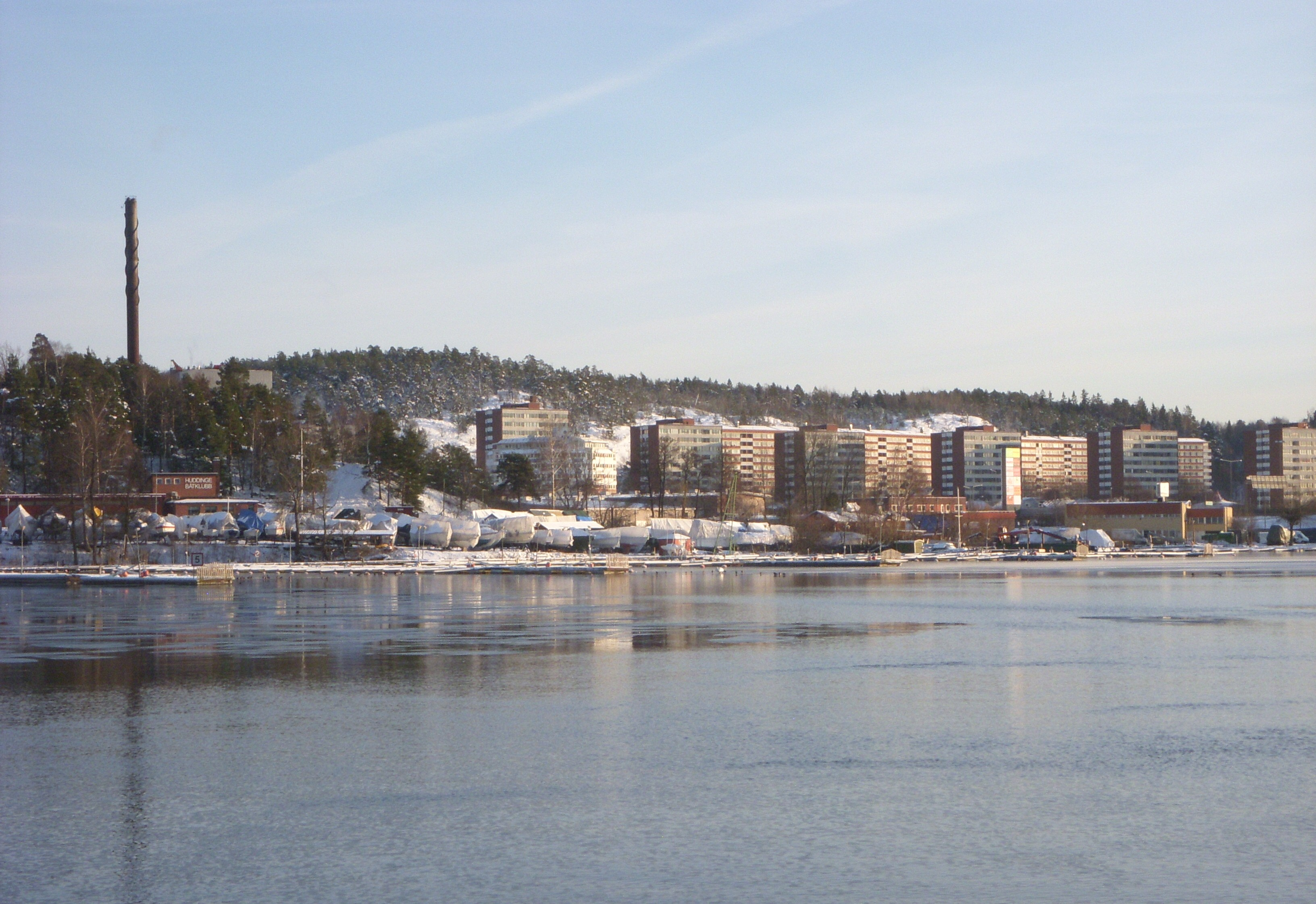 Masmo (formellt Vårby Haga) sett från Vårbyfjärden